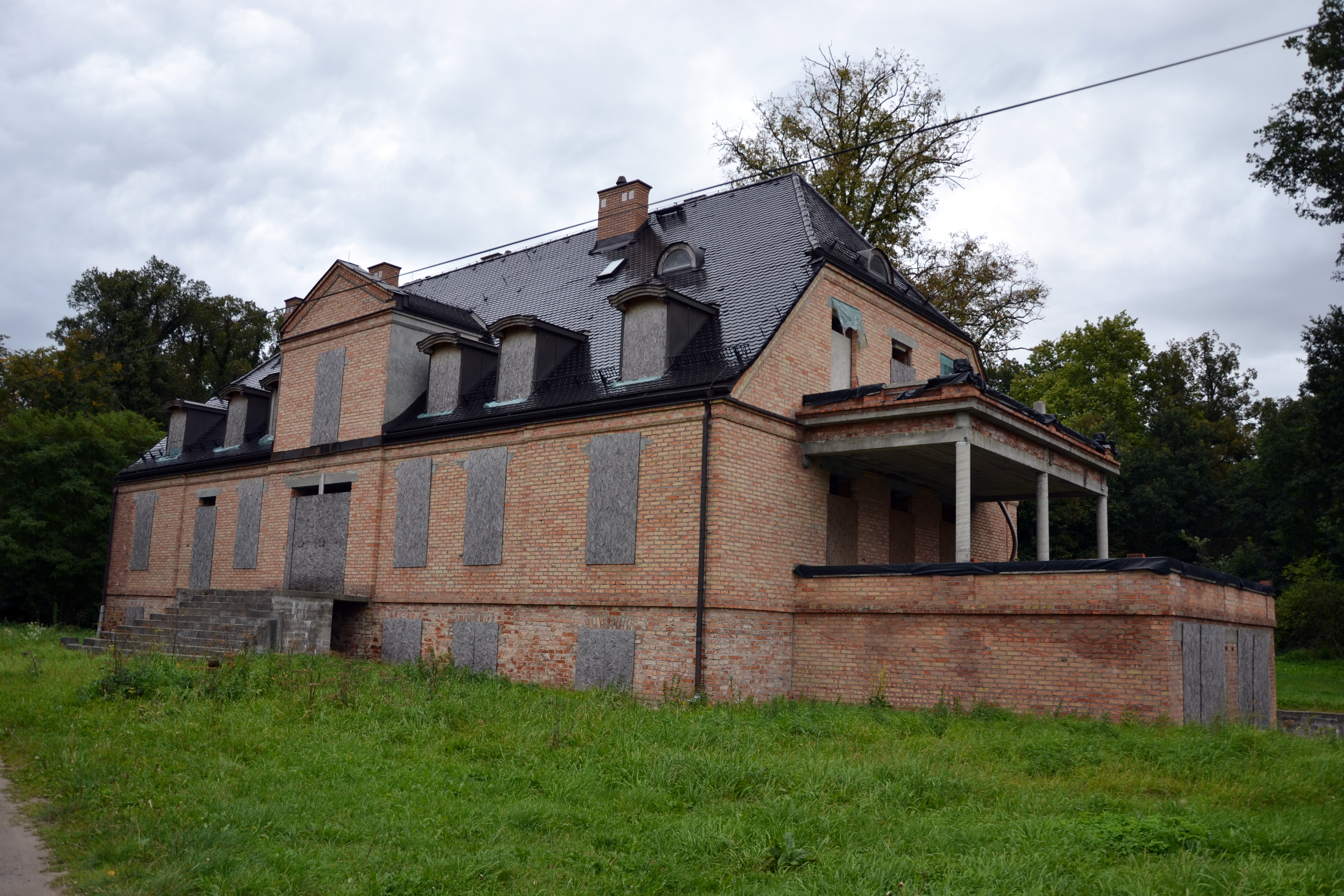 Rurka - dwór (ruina)